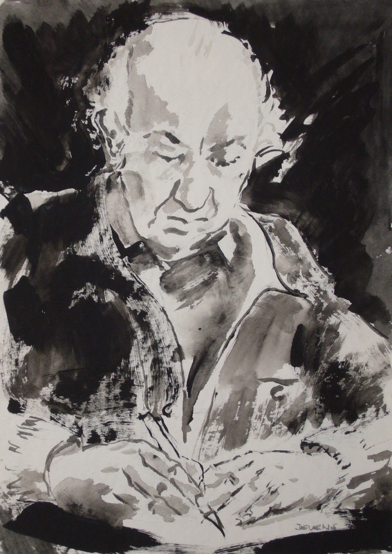 Rainer Devens: Prof. Georgi Schischkoff